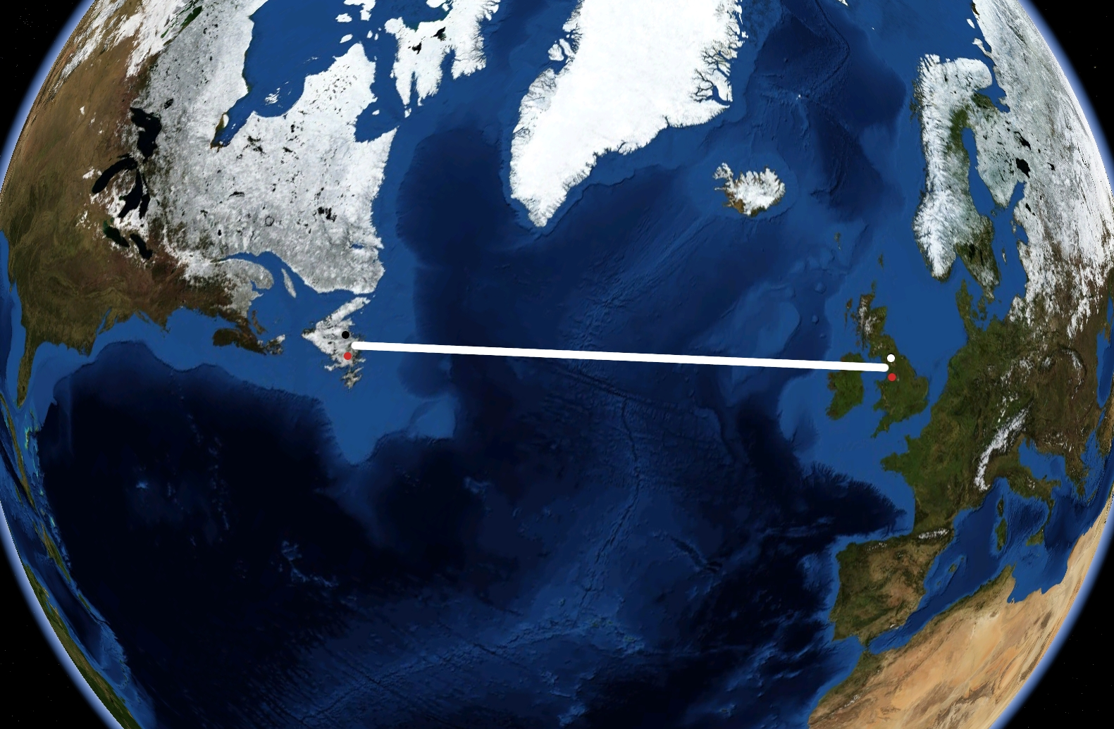 Dectra Atlantikroute